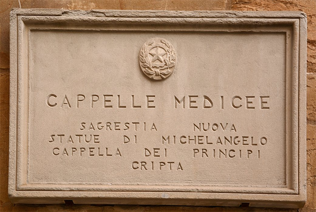 Tafel beim Eingang der Medici-Kapelle in Florenz